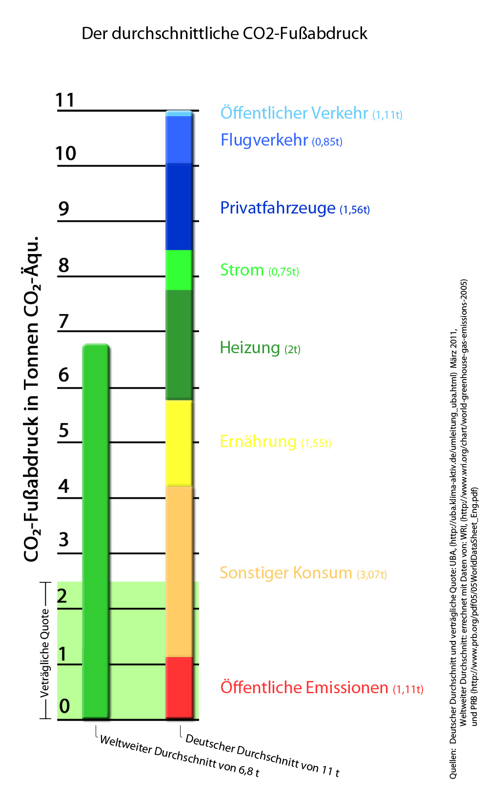 Die Grafik stellt den deutschen und den weltweiten durchschnitts-CO2-Fußabdruck im Vergleich dar. Der deutsche CO2-Fußabdruck ist dabei in acht verschiedene Gebiete unterteilt.